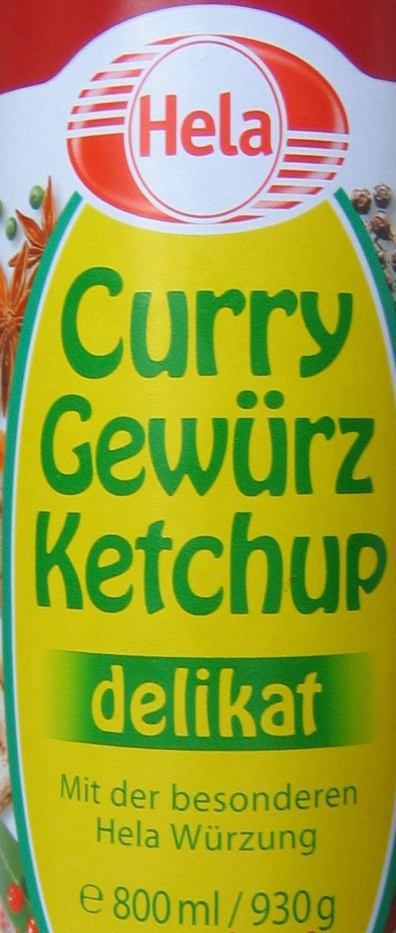 Ketchup-Flasche als Veranschaulichung für Deppenleerzeichen Warnhinweis: Ich mache entsprechend der GNU-FDL keine Rechte an dem Bild geltend. Bei der Verwendung außerhalb von Wikipedia-Artikeln sollte jedoch beachtet werden, dass Rechte an einem möglicherweise bestehenden Geschmacksmuster des Herstellers (Hela Gewürzwerk Hermann Laue GmbH & Co. KG, Beimoorweg 11, 22926 Ahrensburg) oder Dritter verletzt werden könnten. Daher darf das Bild wie alle anderen Bilder von Geschmacksmustern auch nicht auf die WikiCommons hochgeladen werden. Näheres siehe Geschmacksmuster. -- H005 12:31, 8. Mär 2006 (CET)